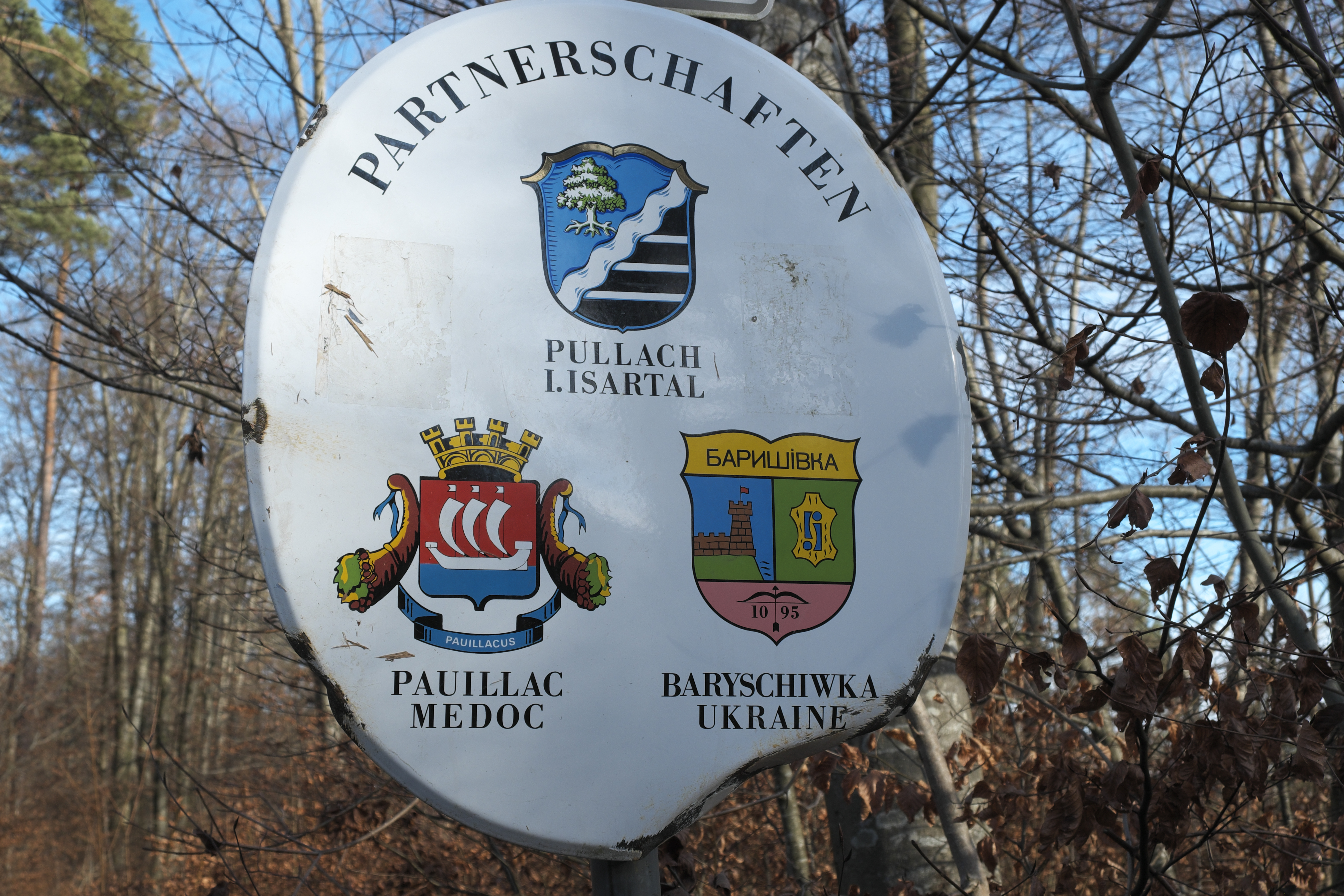 Städtepartnerschaftsschild in Pullach im Isartal im Landkreis München (Bayern/Deutschland)